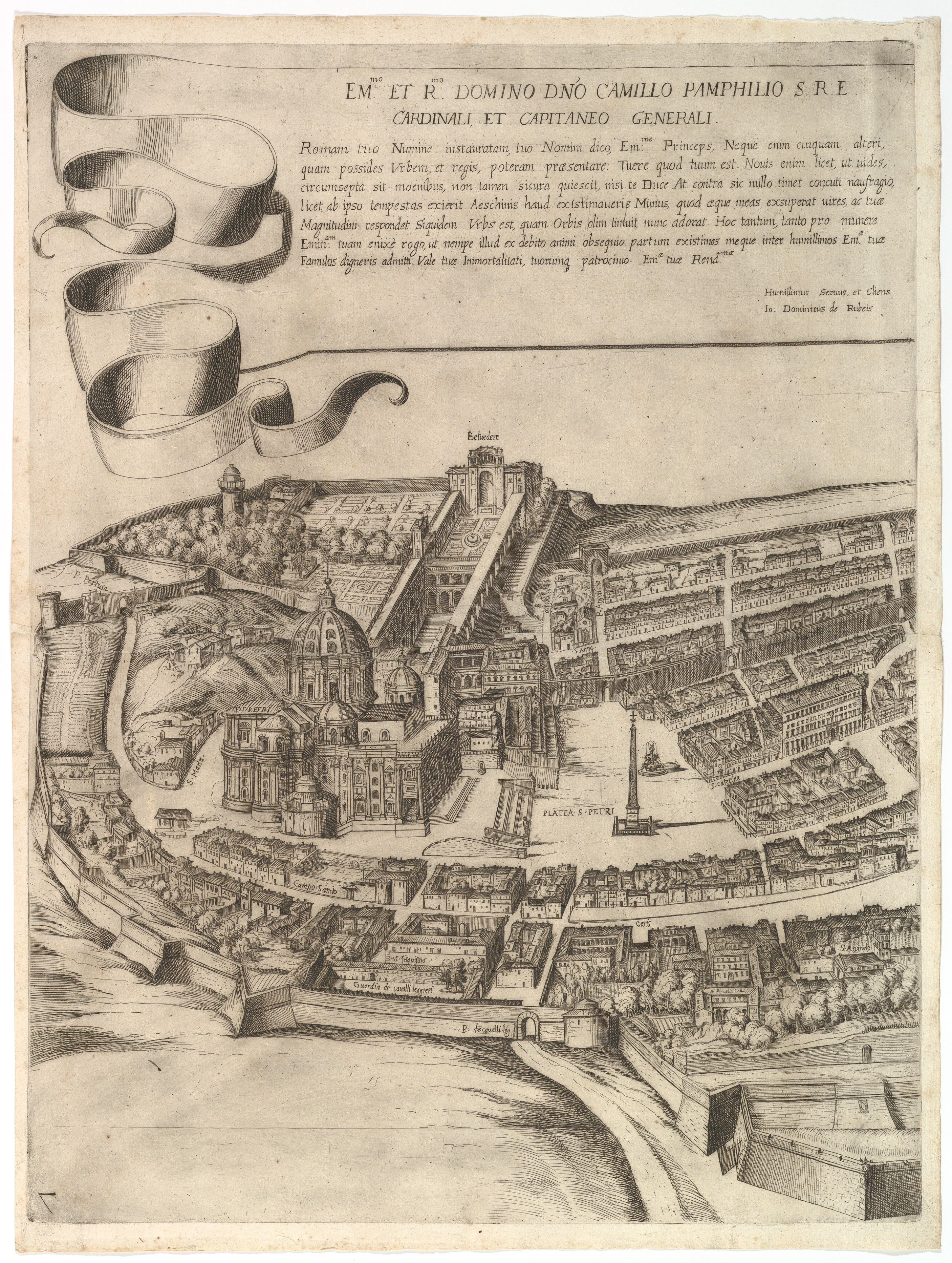 Pianta di Tempesta 1593, edizione di De Rossi 1645